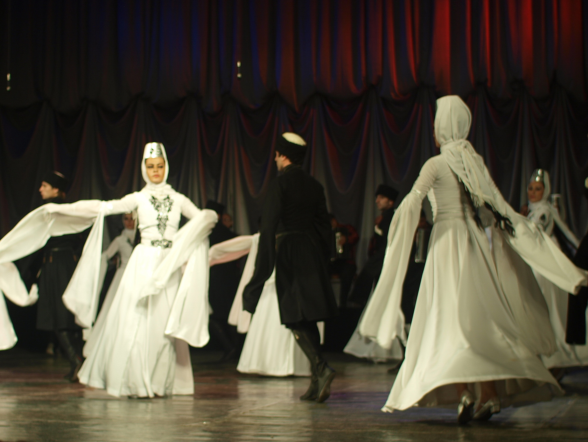 Batumi - Georgian Folklore Dance - Osuri